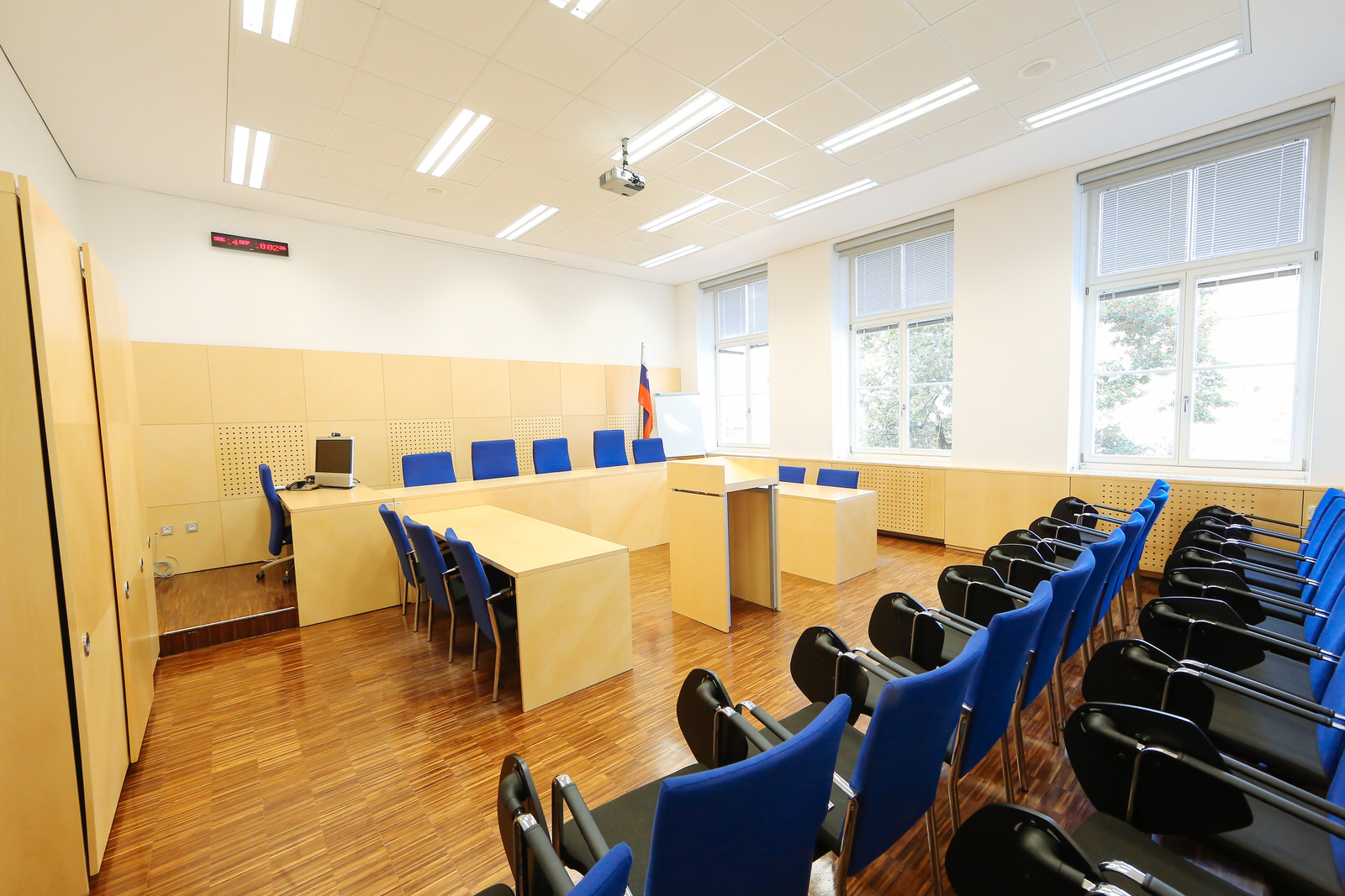 Sodna dvorana